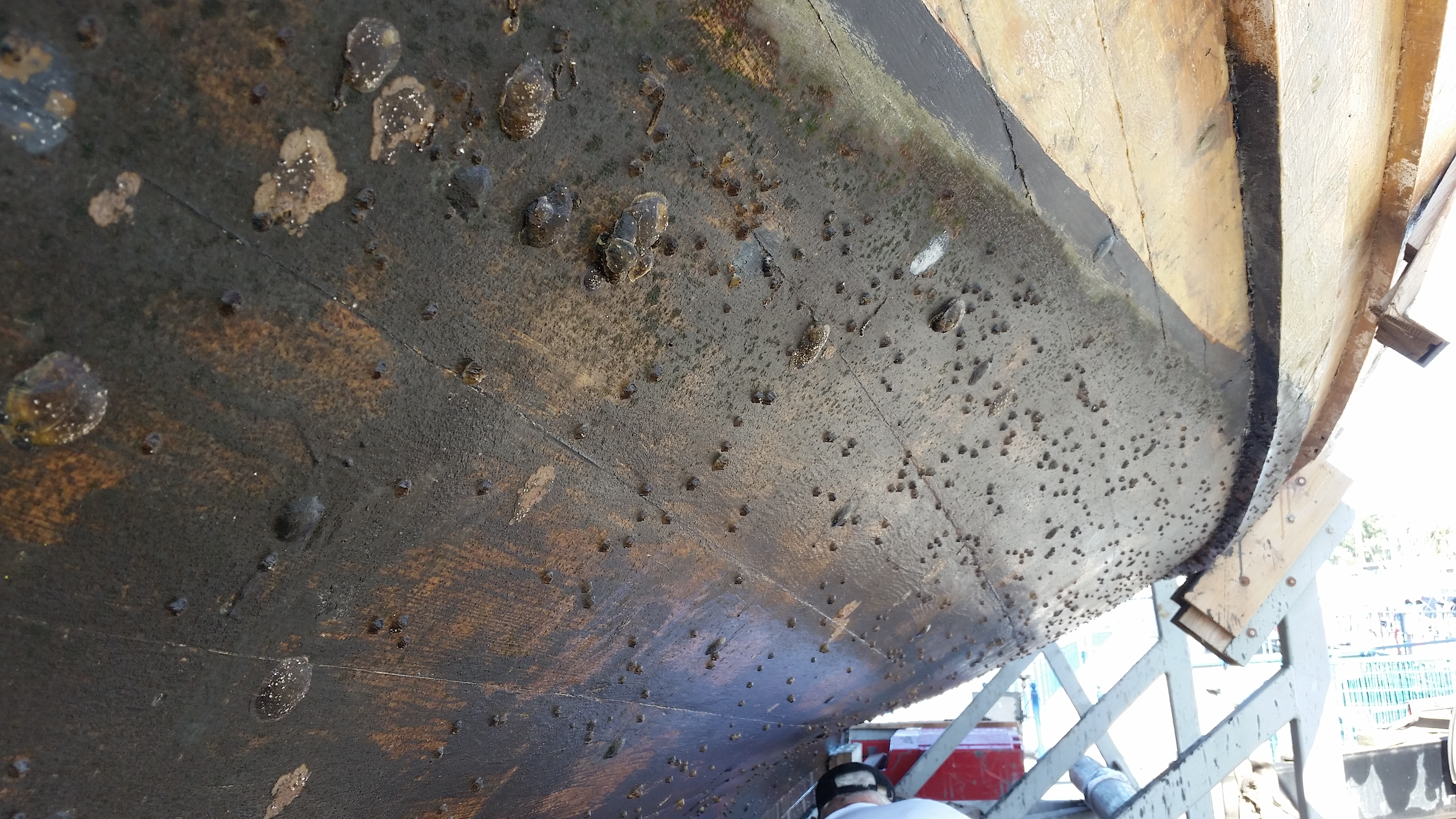 חלק מתחתית הספינה שנפגע מנזקי הים הטבעיים